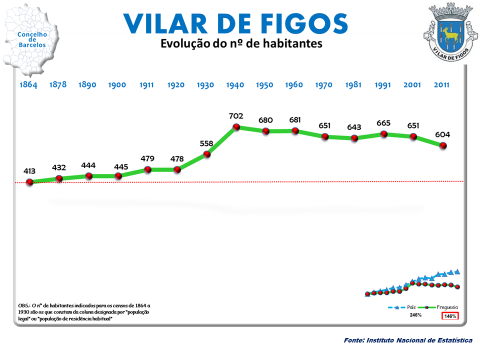 Censos 1864/2011